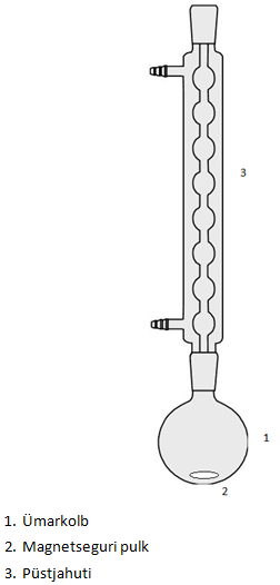 Ümberkristallisatsiooniseade.